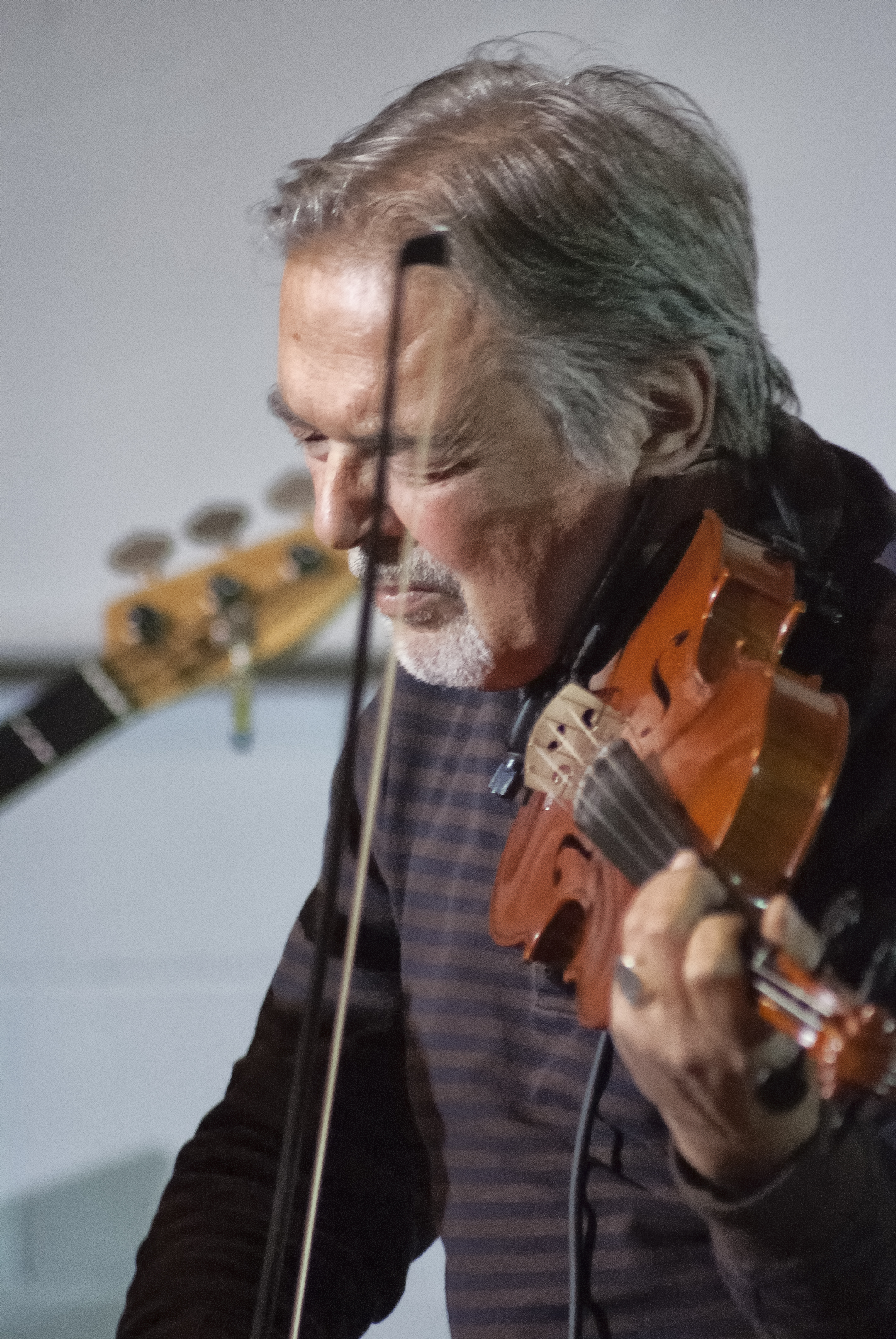 Mauro Pagani (Chiari, 5 febbraio 1946) è un polistrumentista, compositore e produttore discografico italiano.